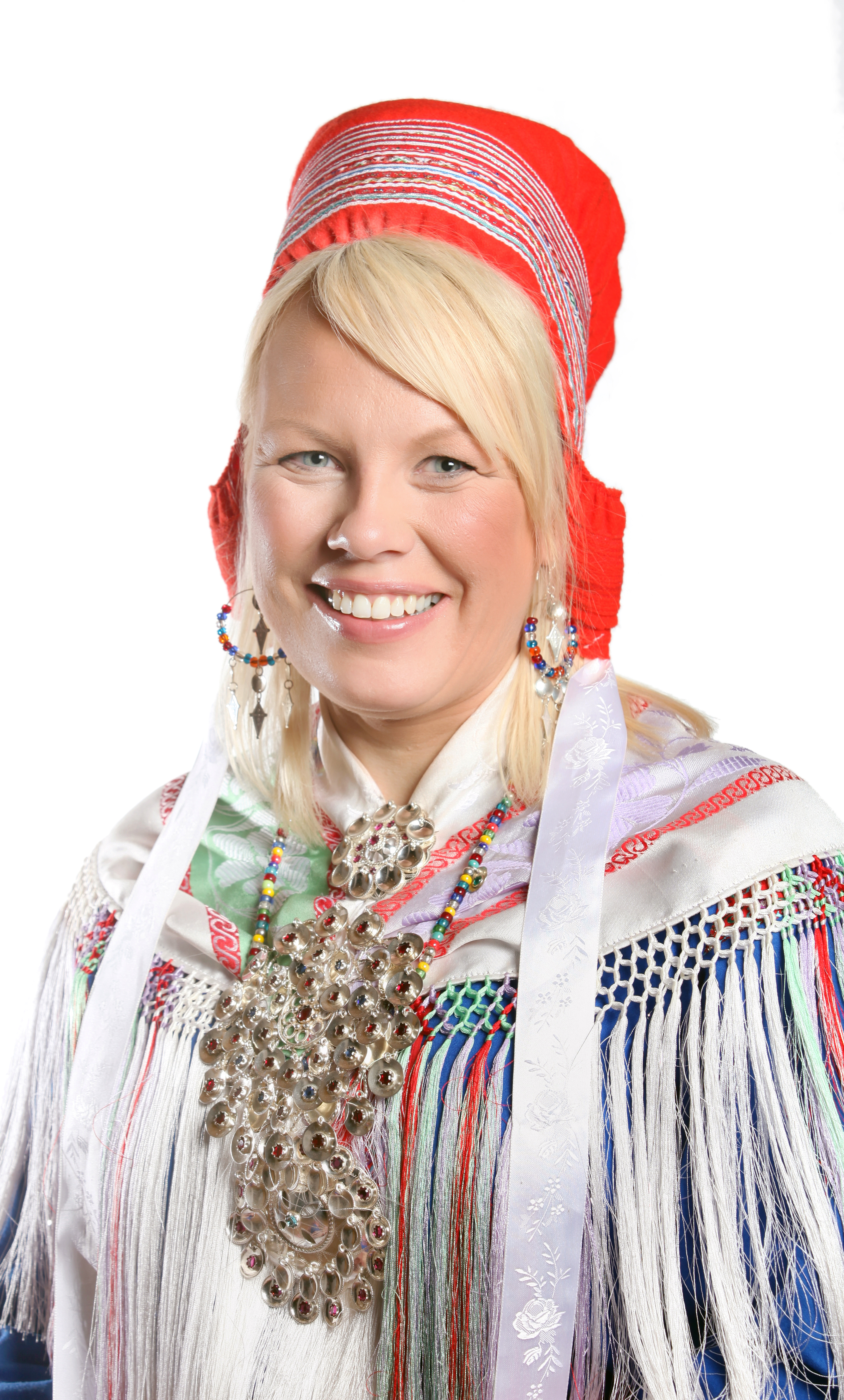 Leder av partiet Árja. Medlem av plan- og finanskomitéen. Foto: Kenneth Hætta / Sametinget.